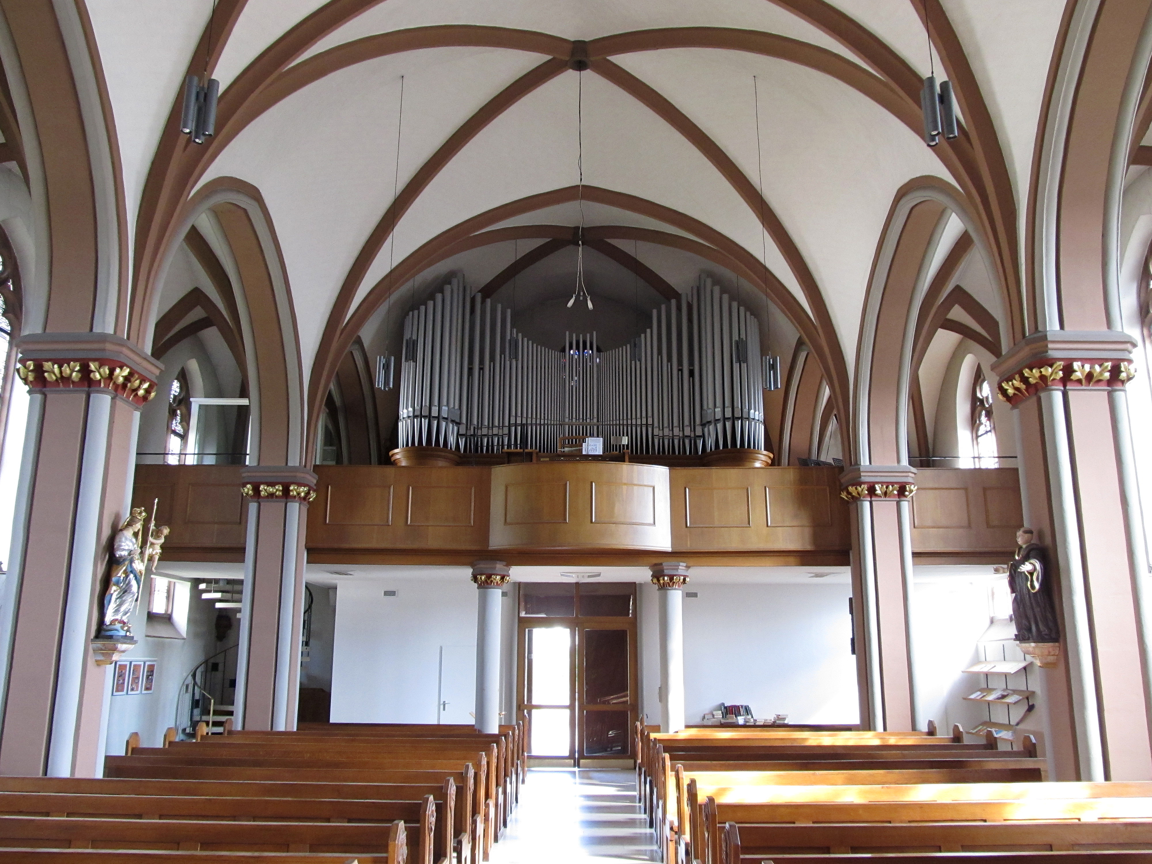 Blick ins Innere der katholischen Pfarrkirche St. Walfridus in Rilchingen-Hanweiler, einem Ortsteil der Gemeinde Kleinblittersdorf, Regionalverband Saarbrücken